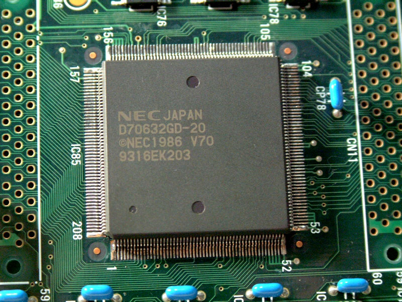 2006/08/20 Baz1521(=Yaca2671) 撮影